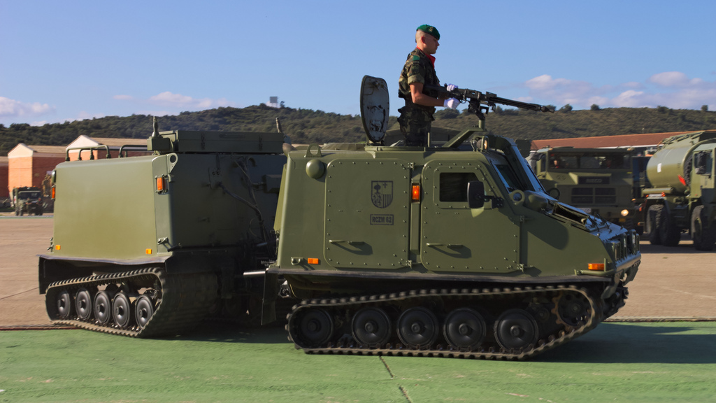 El pasado día 8 de diciembre asistí a una exhibición militar en Sant Climent Sescebes, en la base militar General Álvarez de Castro donde pude ver maquinaria como la de la foto, un TOM (Transporte Oruga de Montaña).